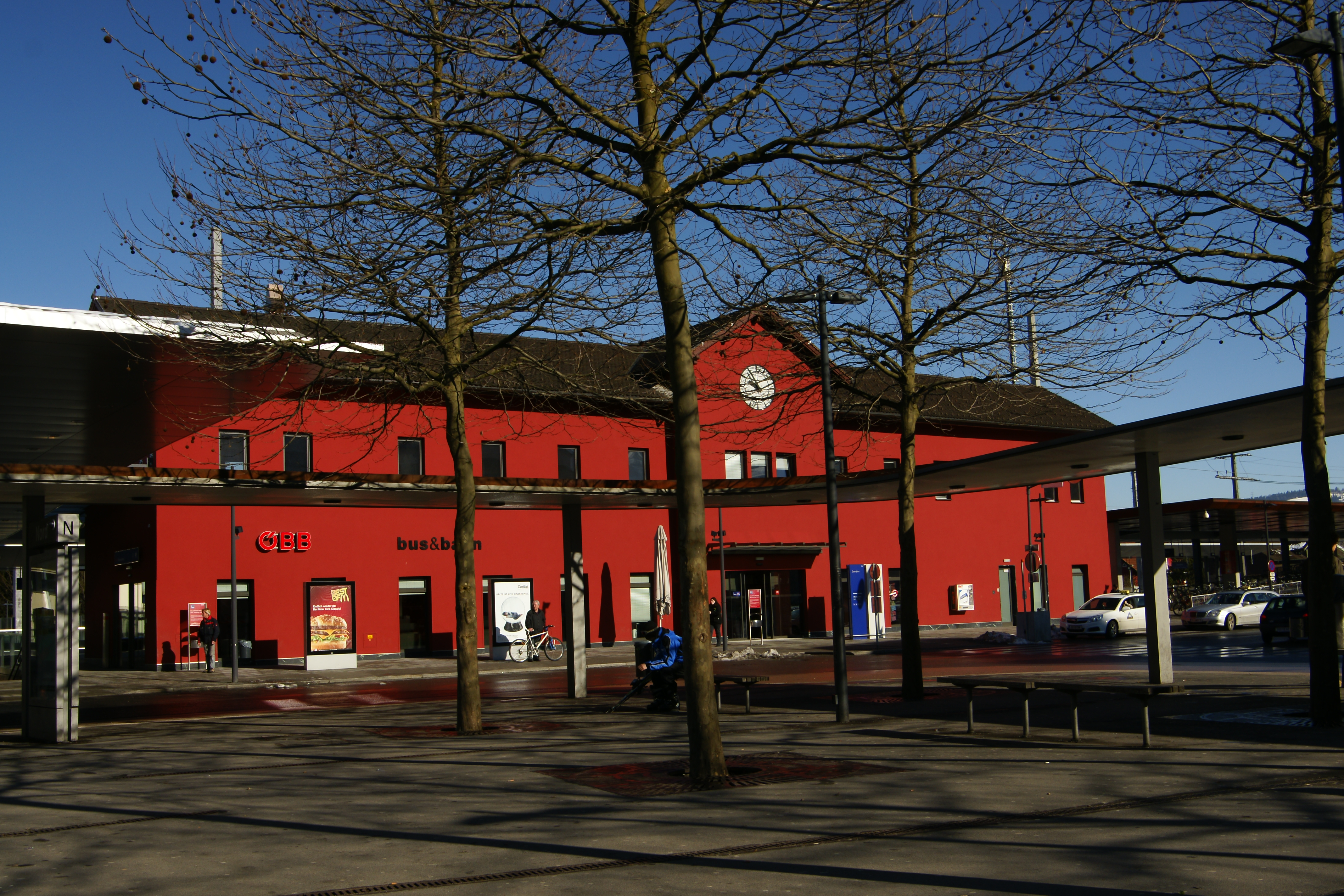 Der Busbahnhof und das von den ÖBB sanierte Bahnhofsgebäude in Dornbirn, in Vorarlberg.